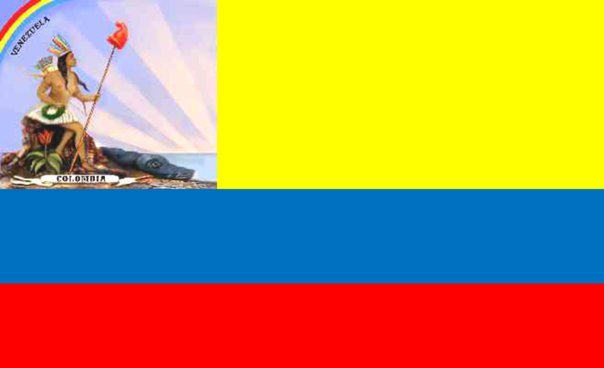 Bandera de la primera república.